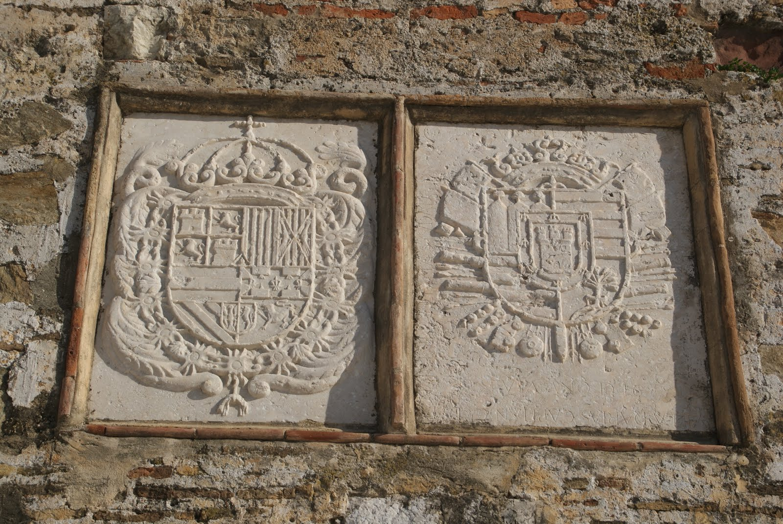 Escudos de armas situados sobre la puerta del pasadizo que une la Plaza de Armas con el camino de ronda de la contraescarpa del Foso de San Felipe, en Ceuta. Uno es de la Corona de España en tiempos de Carlos II, y otro fechado en 1699, del entonces gobernador de Ceuta don Francisco del Castillo Fajardo, marques de Villadarias.